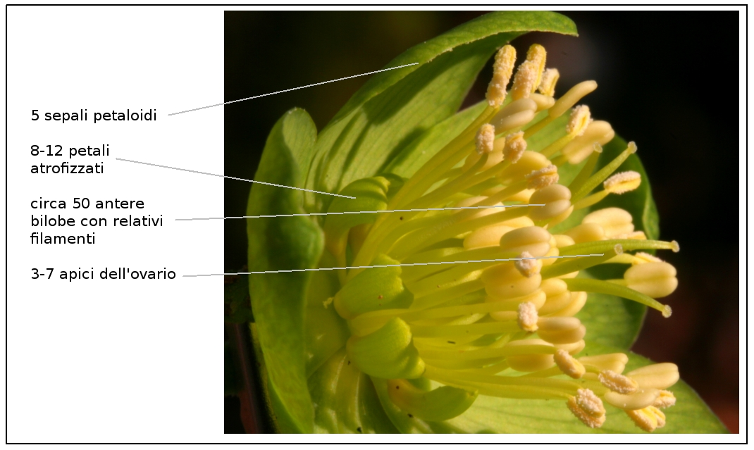 Helleborus viridis (parti del fiore)